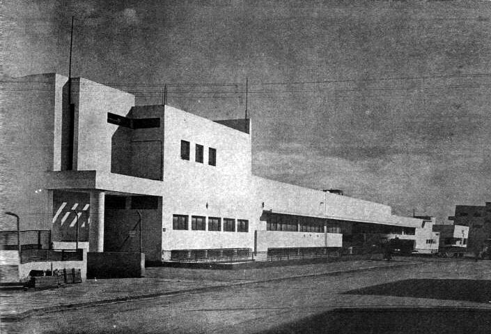 מוסך דן בתל אביב